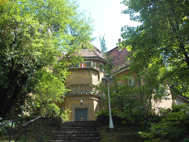 Das Buddhistische Haus Paul Dahlkes in Berlin